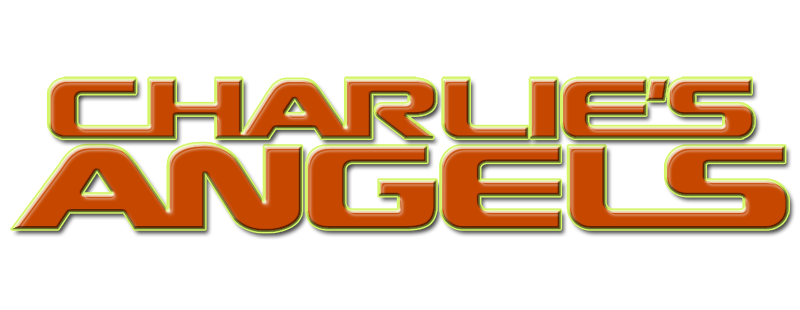 Logo original du film.